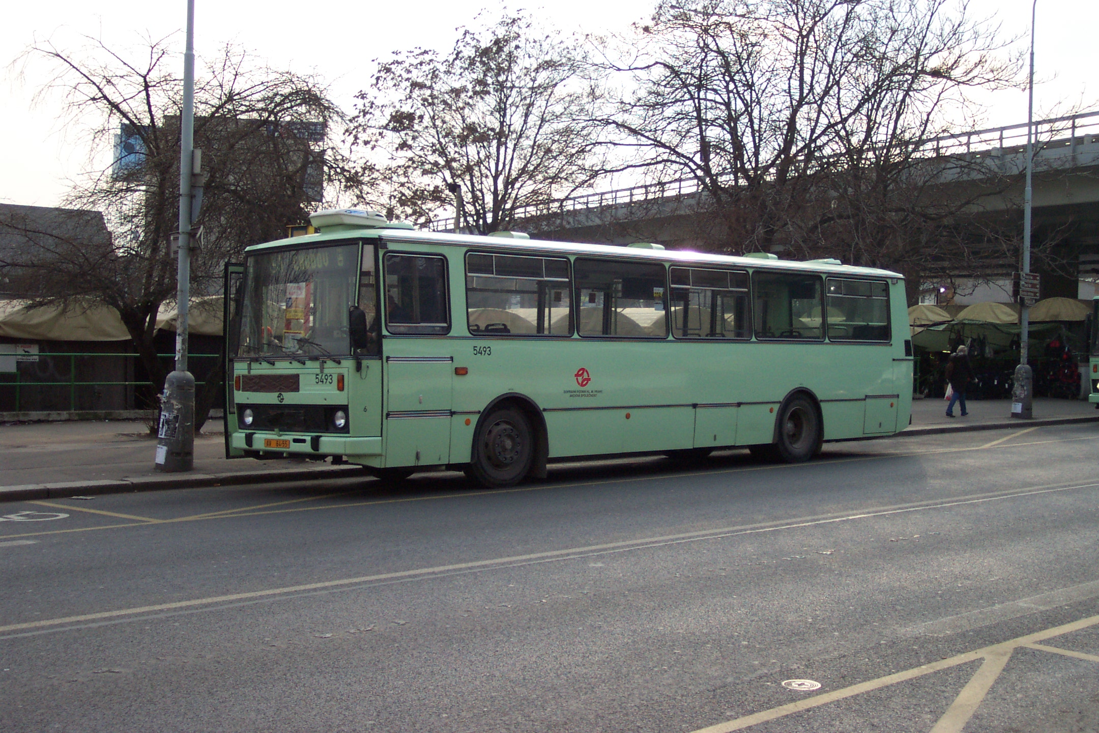 Karosa bus at Prague Florenc, modified to be able to carry people with wheelchairs - Autobus typu Karosa na autobusovém nádraží na Florenci v Praze uzpůsobený pro přepravu vozířkáčů